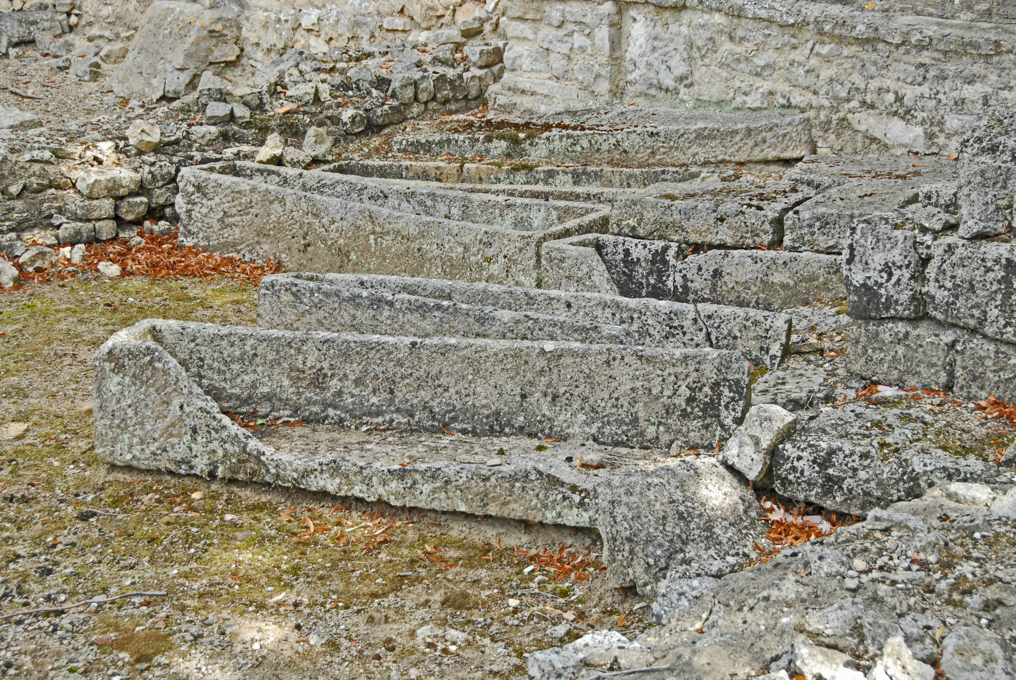 Civaux, Sanktuarium, Sarkophage